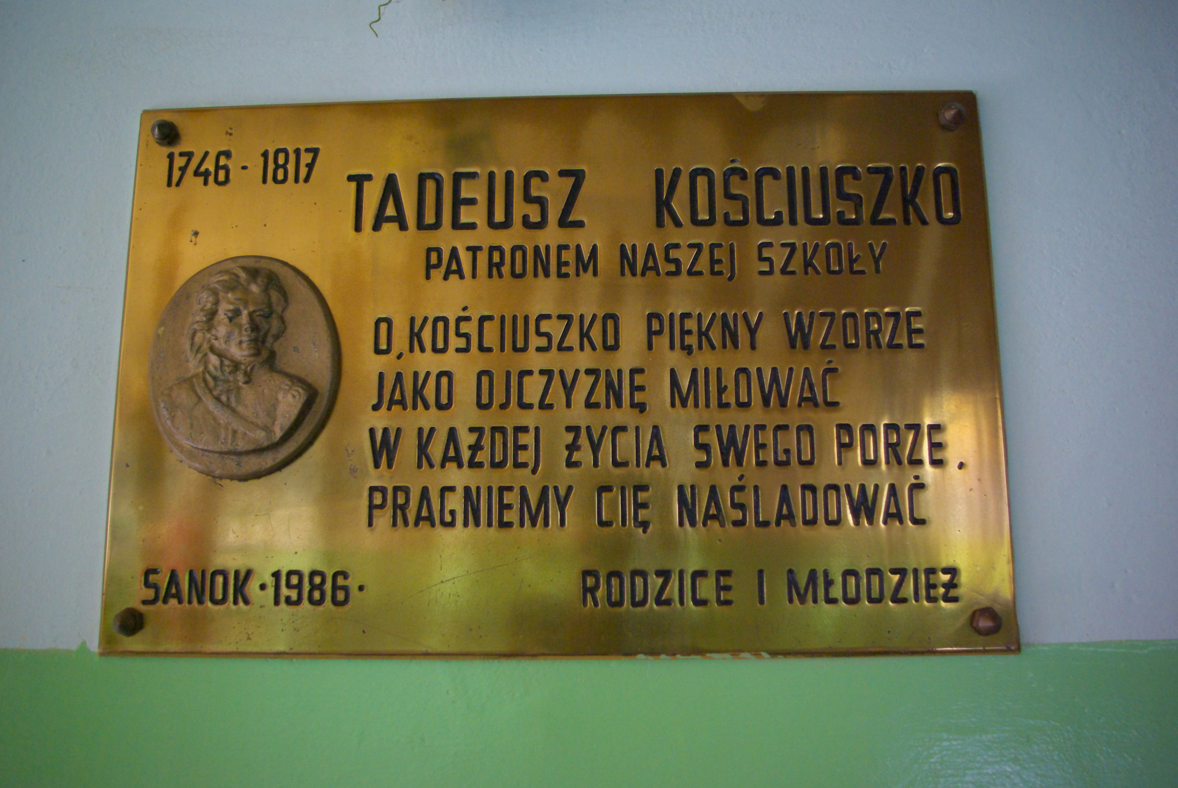 Szkoła Podstawowa nr 3 im. Tadeusza Kościuszki w Sanoku. Tablica pamiątkowa ku czci patrona